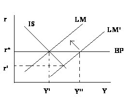 Politica monetaria nell'ISLM con cambi fissi e PMK